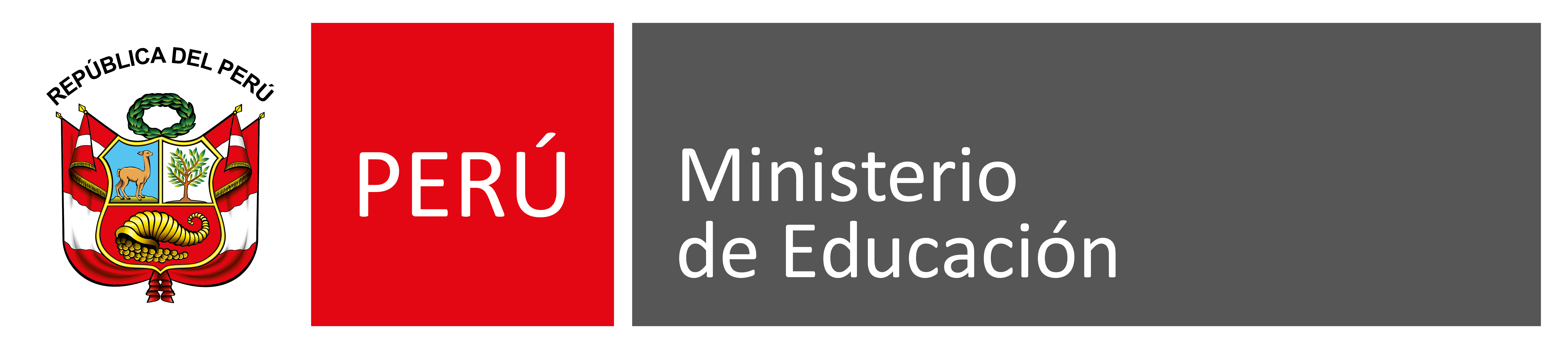 Logo del Ministerio de Educación del Perú - MINEDU